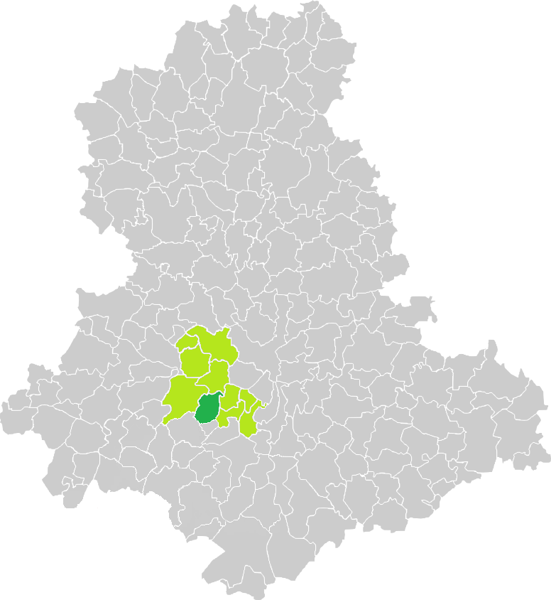 Carte de situation de la commune de Saint-Martin-le-Vieux (en vert foncé) dans le votre Canton (en vert clair) sur une carte des communes de la Haute-Vienne